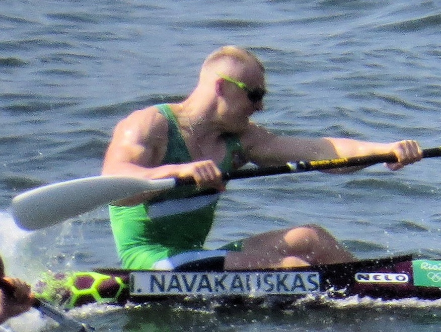 Sx50